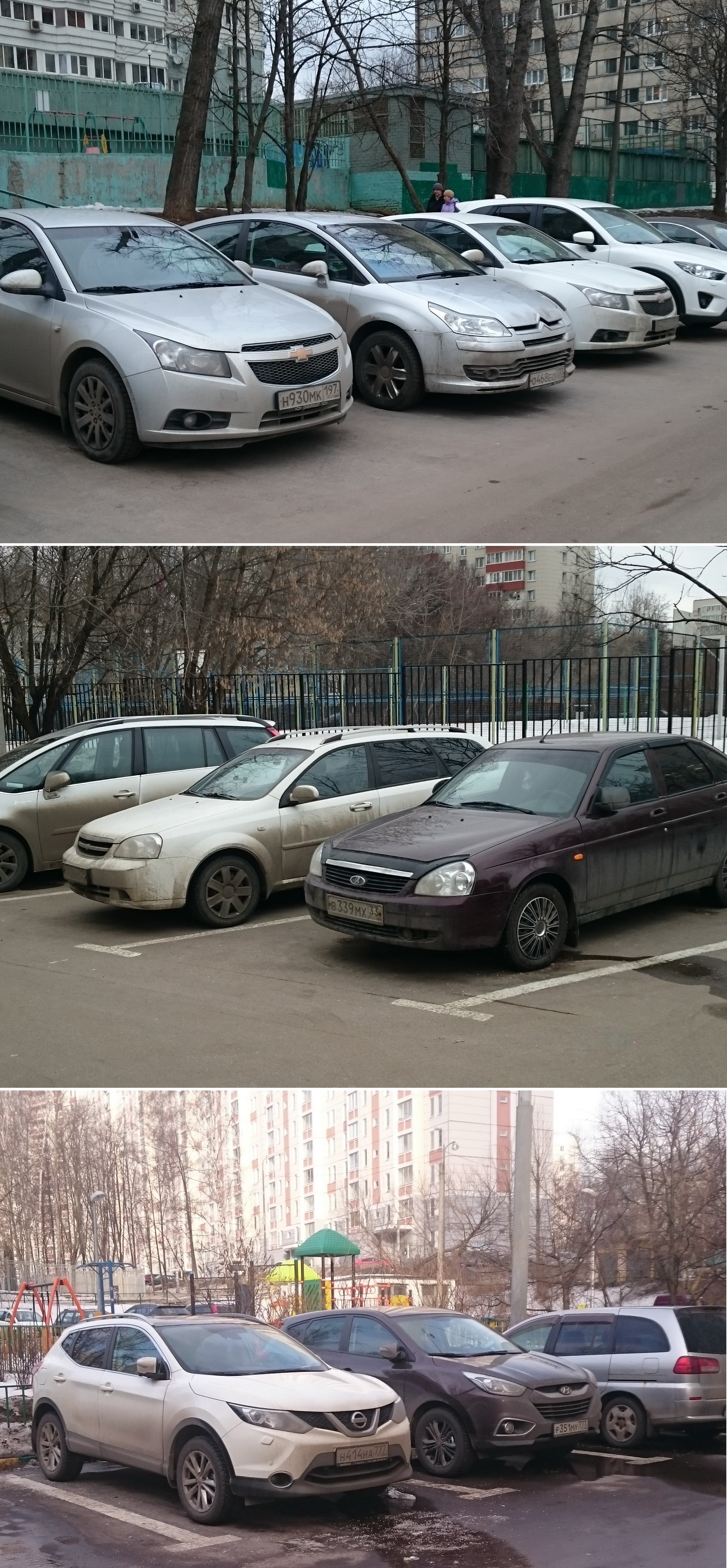 Машины одного поколения часто имеют схожие черты дизайна экстерьера